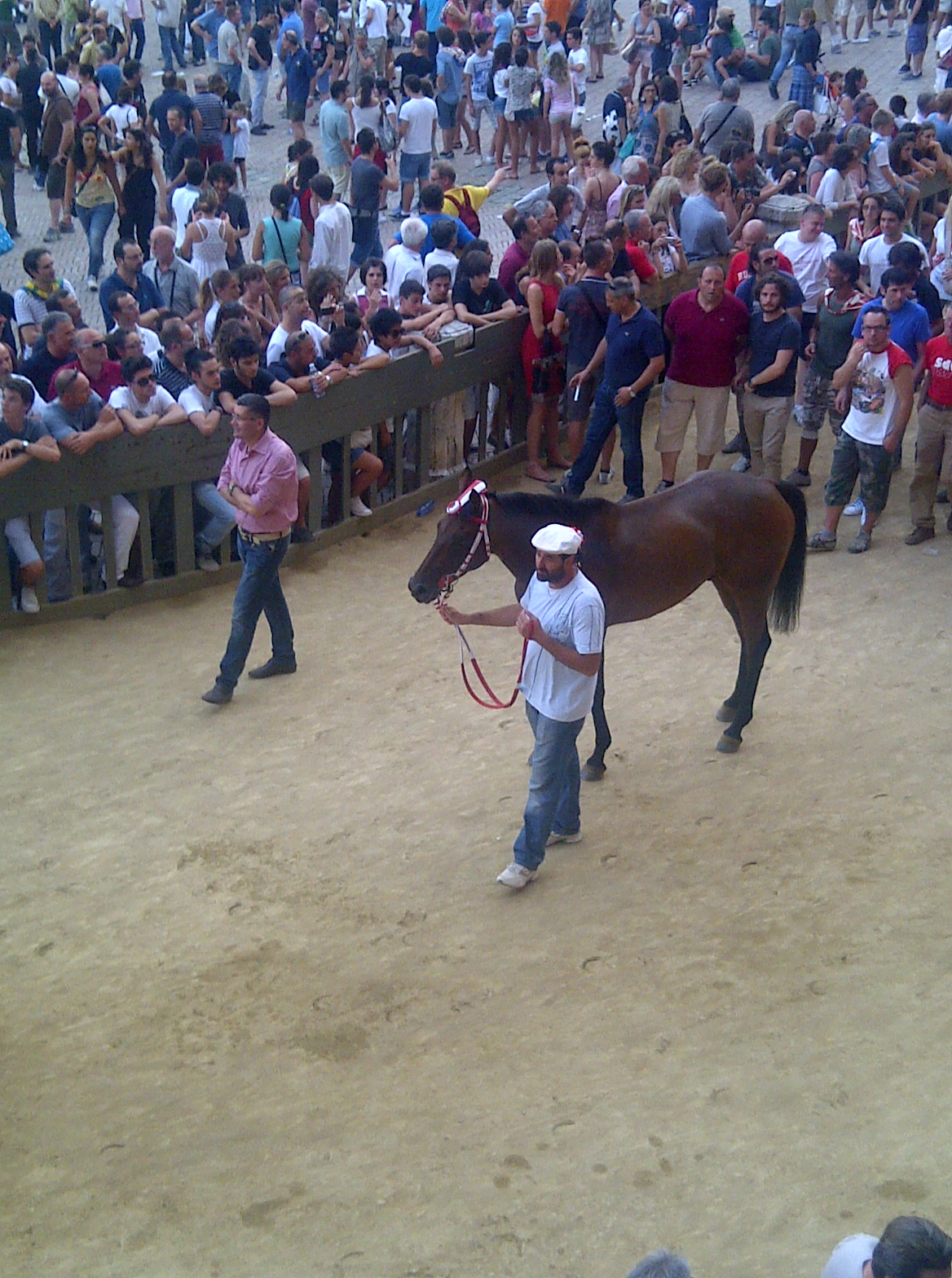 Uscita da Piazza della Giraffa